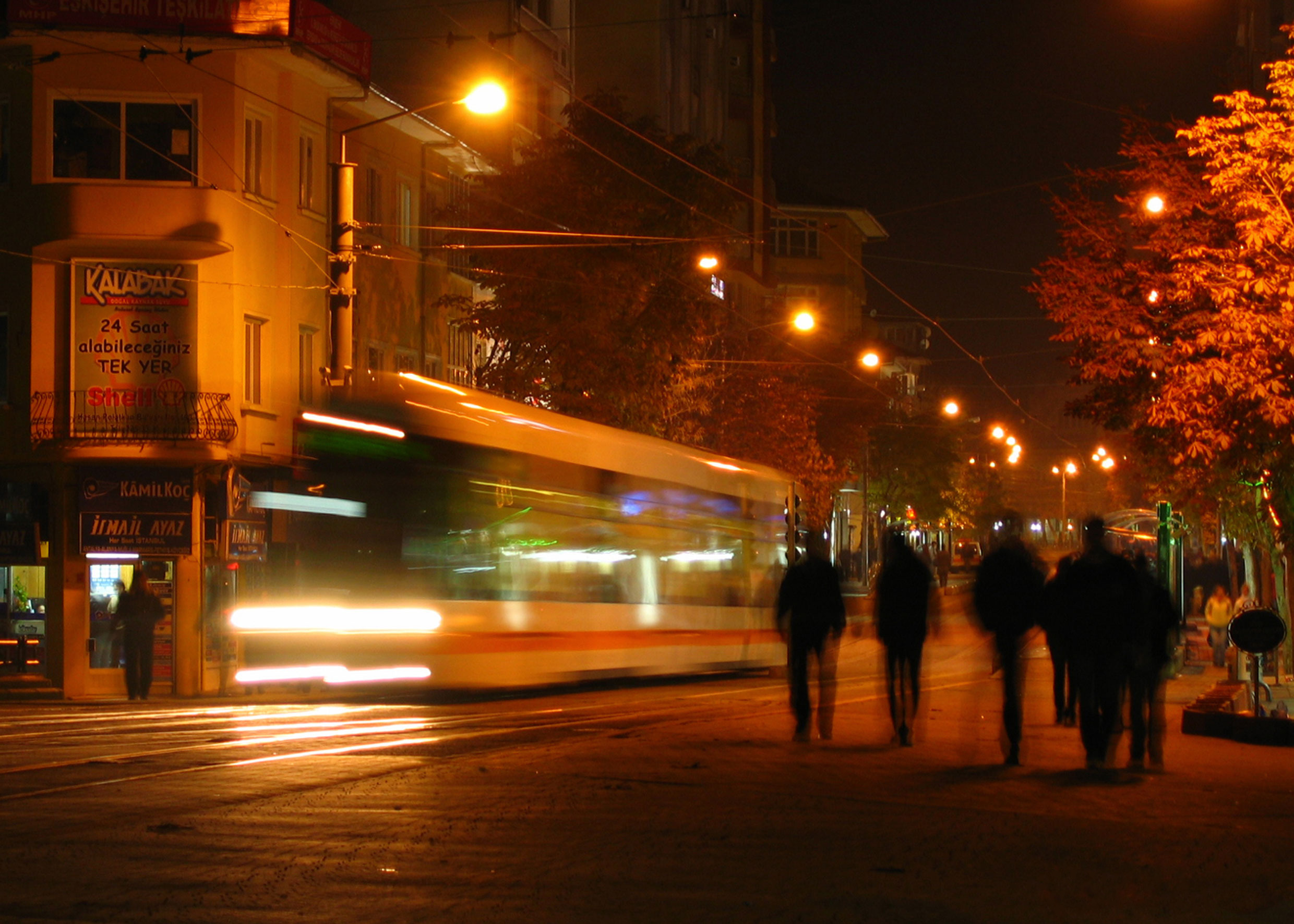 Photo by:Çağıl Adapınar. A night in Eskişehir. (Turkey)